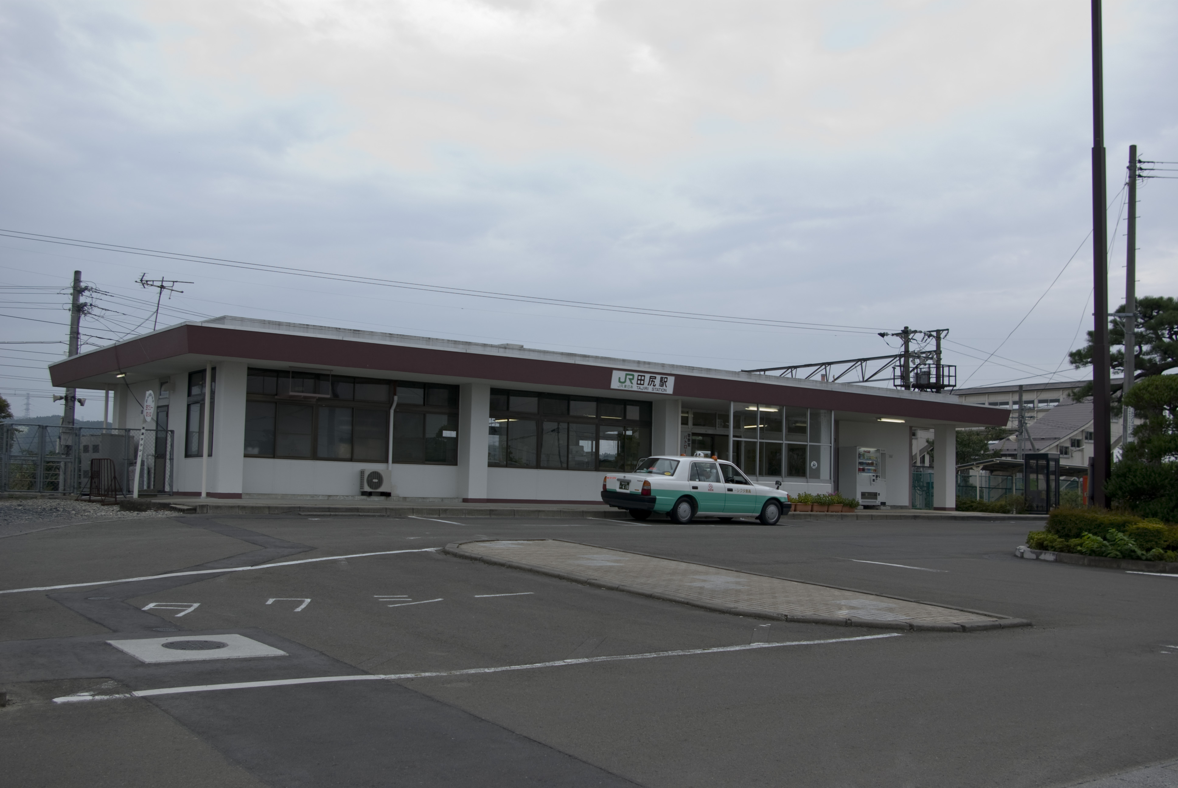 JR東北本線田尻駅